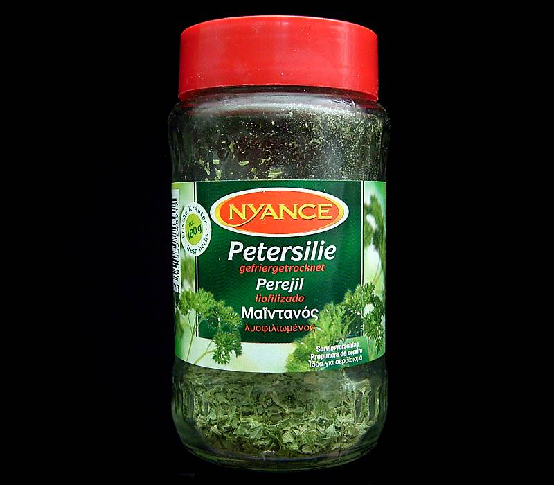 Petroselinum crispum freeze dried